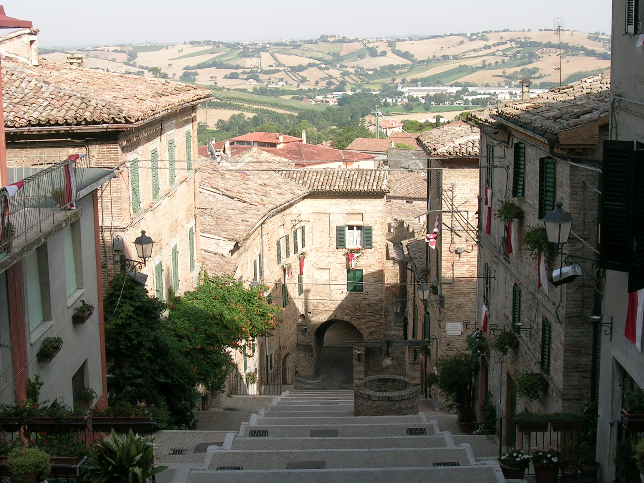 Corinaldo